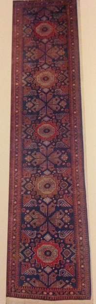 ковер "Арцвапар" как дань армянскому танцу орла.